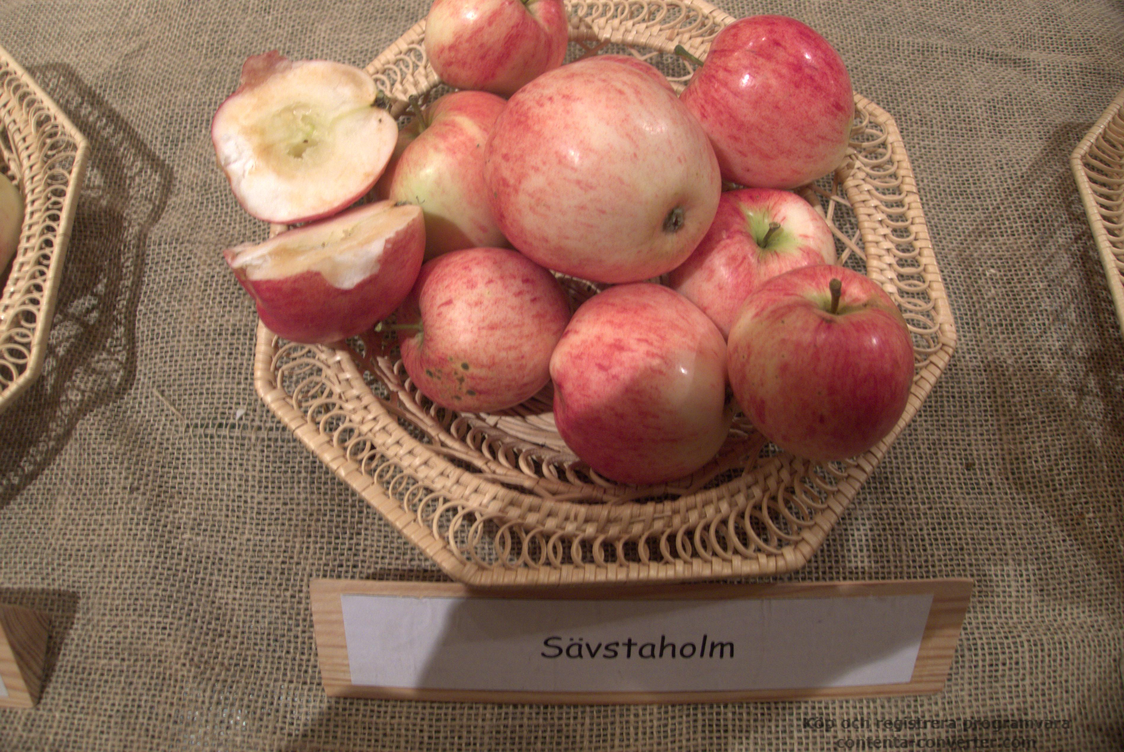 Äpplen av sorten Säfstaholm